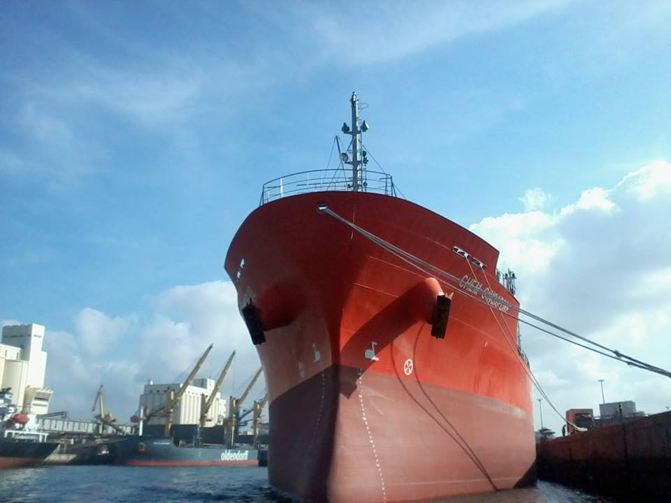 Proue du navire CHEM SINGAPORE en quai . Casablanca - Morocco - IMO: 9705768 MMSI: 636016364 Indicatif d’Appel: D5FU4 Pavillon: Liberia Genre du navire: Tanker Jauge brute: 12128 Port en lourd: 19996 t Longueur Hors Tout x Largeur Hors Tout: 145m × 24.2m Année de Construction: 2015